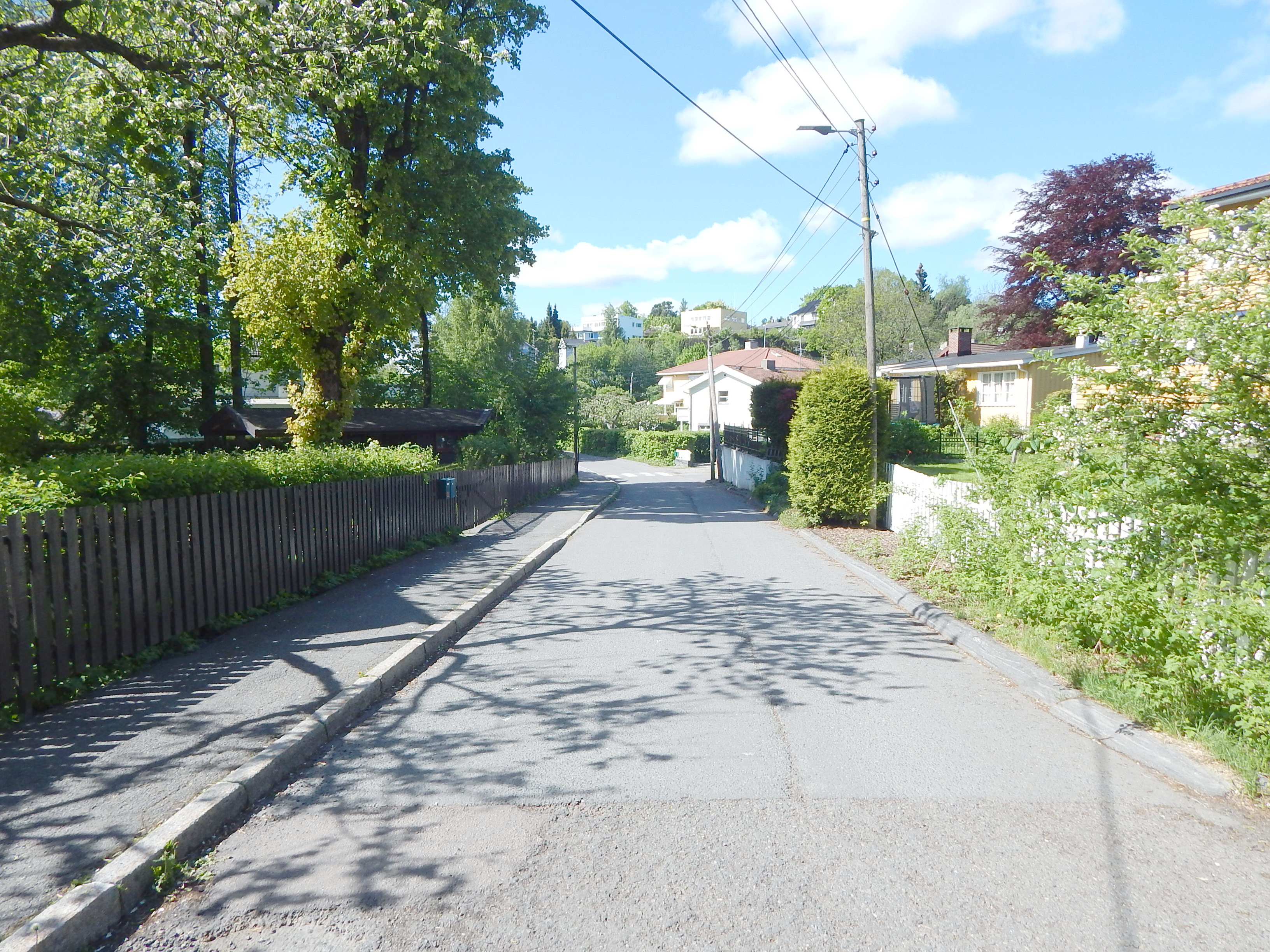 Tuengveien